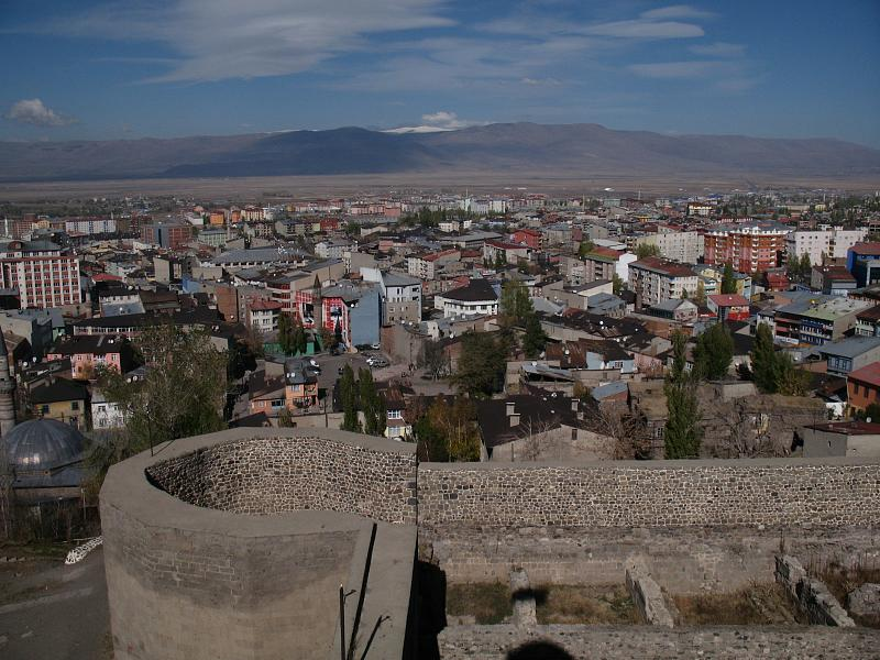 Ooh en aah, maar de citadel is niet bijster interessant.